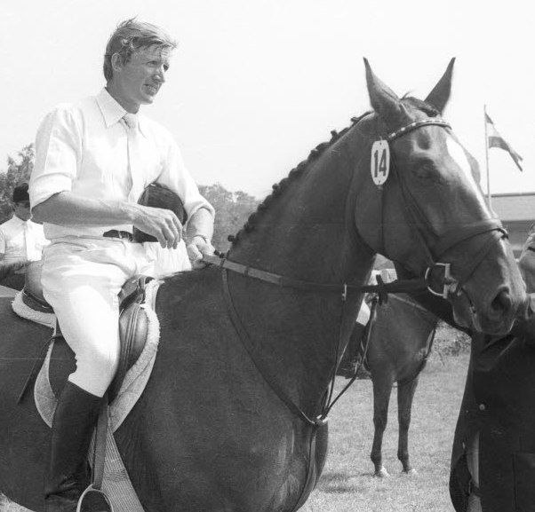 Vielseitigkeitsturnier für Pferde auf dem Gelände an der Olshausenstraße 65-67. Im Bild der Bundestrainer der Vielseitigkeitsreiter Max Habel (rechts) gratuliert Herbert Blöcker auf "Marlandus" zum Sieg.